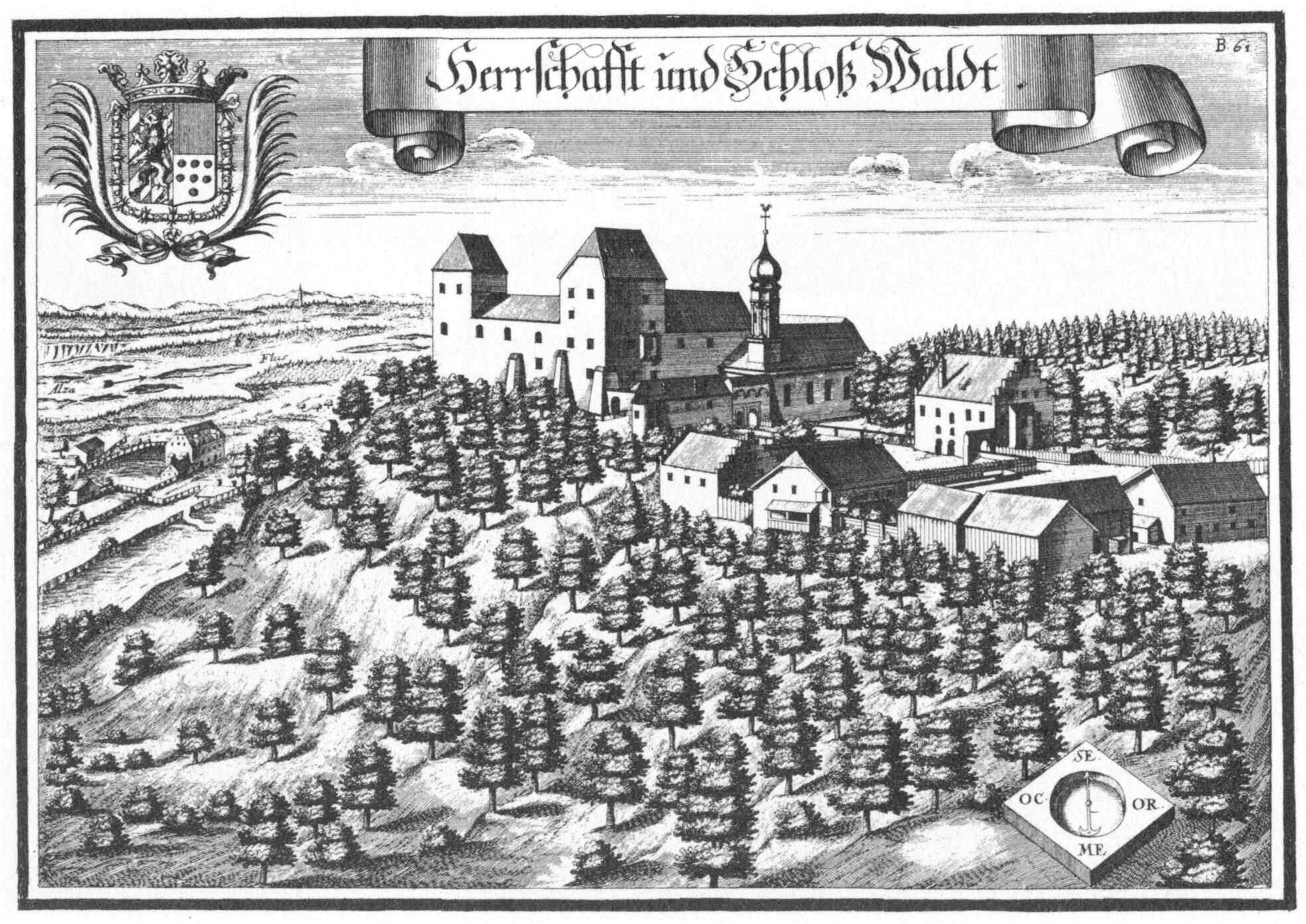 Schloss Wald an der Alz nach einem Stich von Michael Wening (1721)